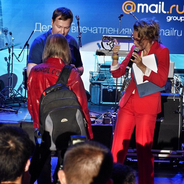 На открытии нового офиса Мэйл.ру, 2013 год